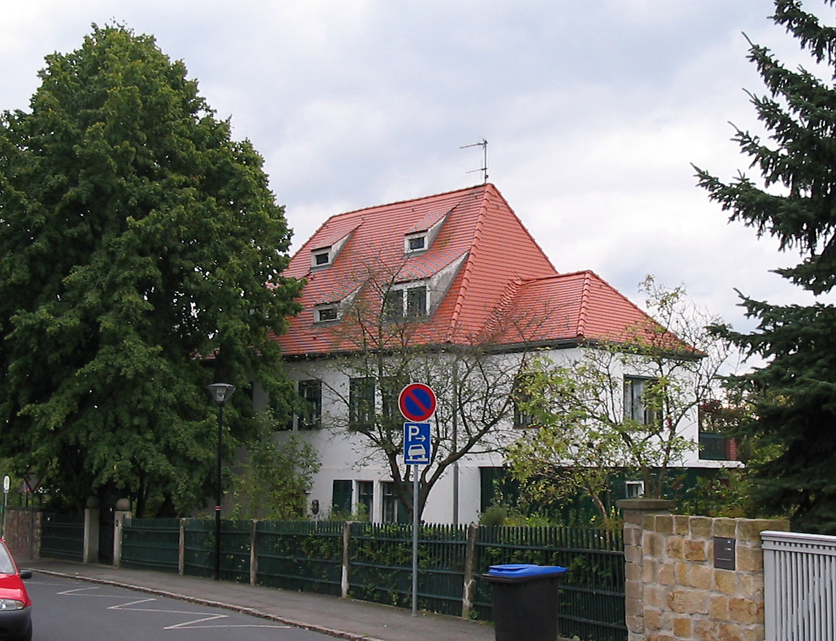 Radebeul, Kyau-Haus, links eine 300-jährige Linde